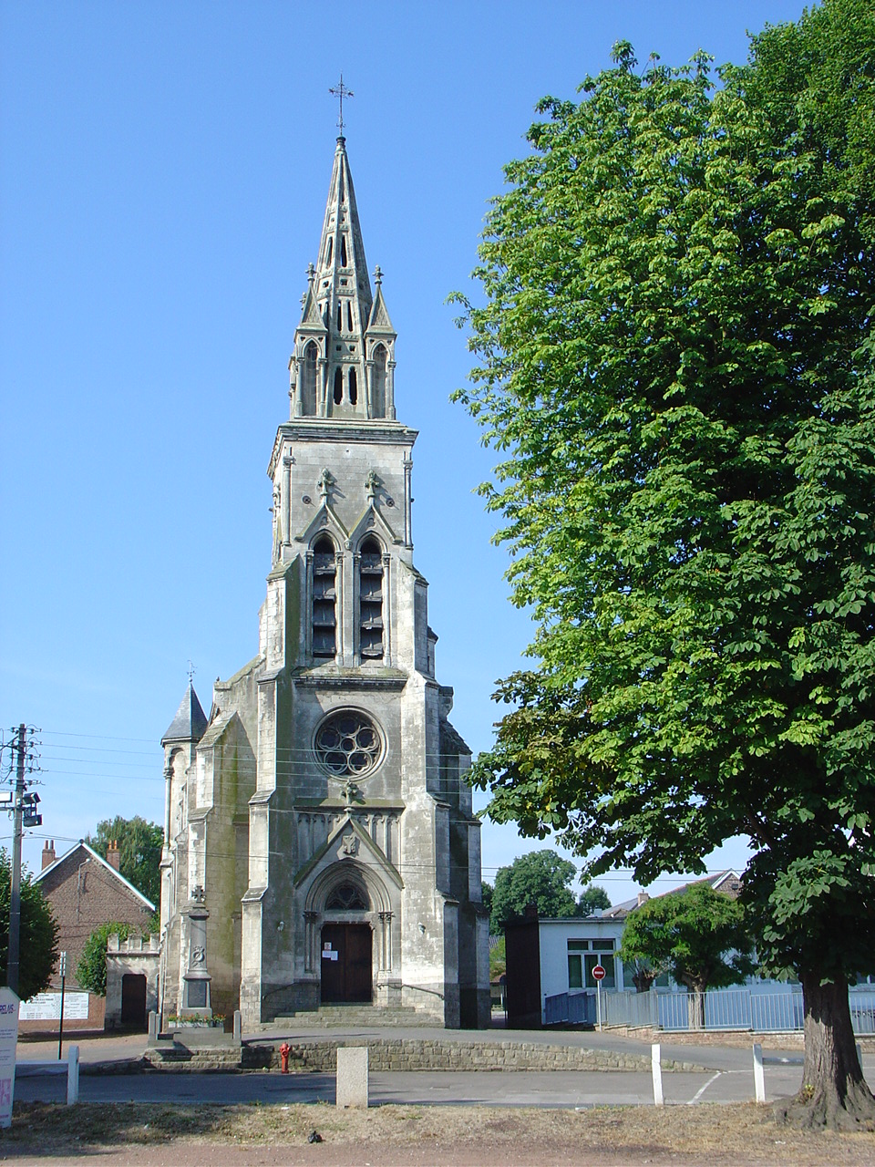 Église de Lozinghem